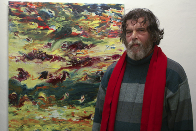 Marzio Banfi davanti a una delle sue opere